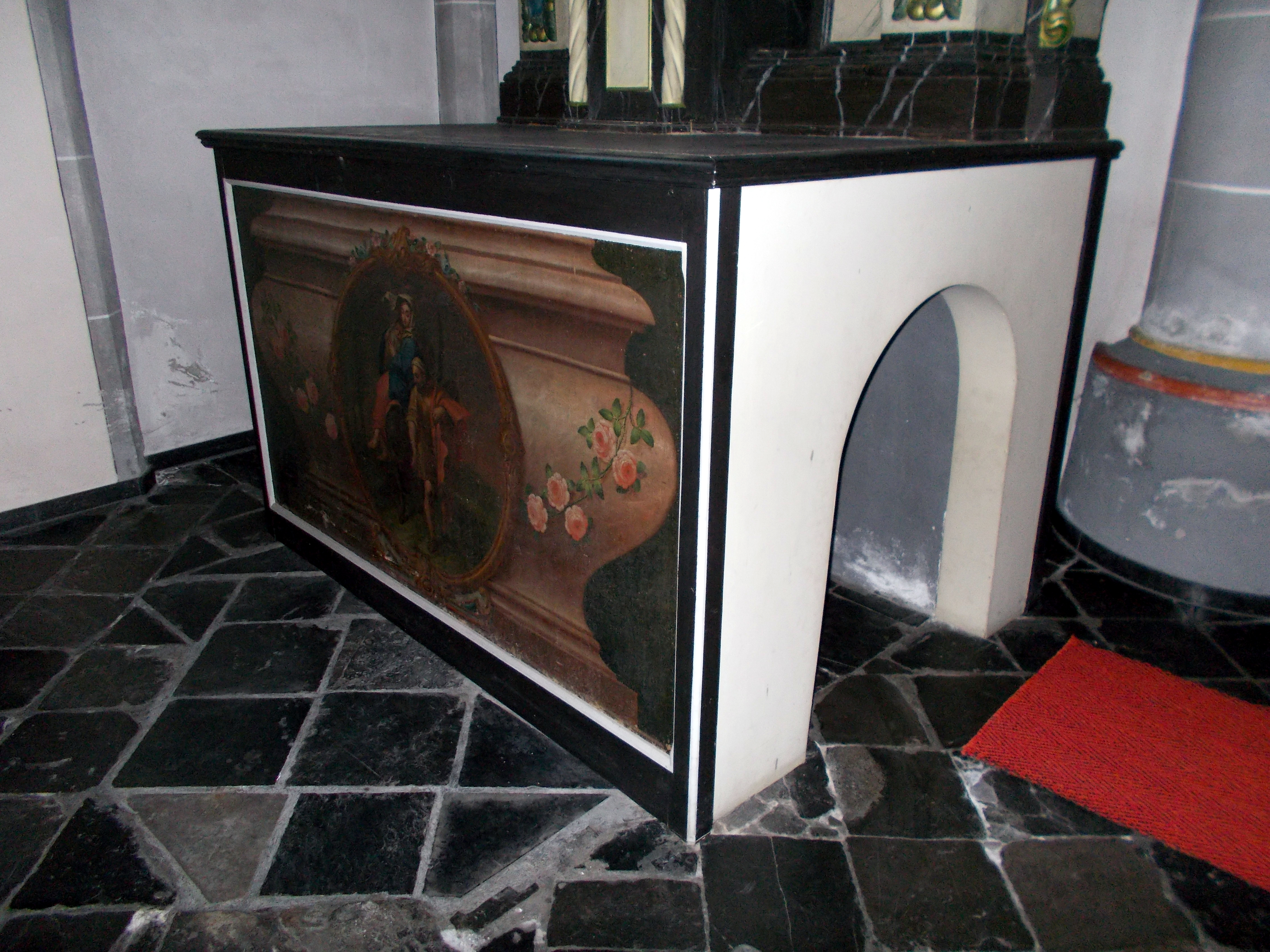 Kriechaltar in St. Gerebernus. Der Unterbau mit Tunnel ist aus dem 15. Jahrhundert.